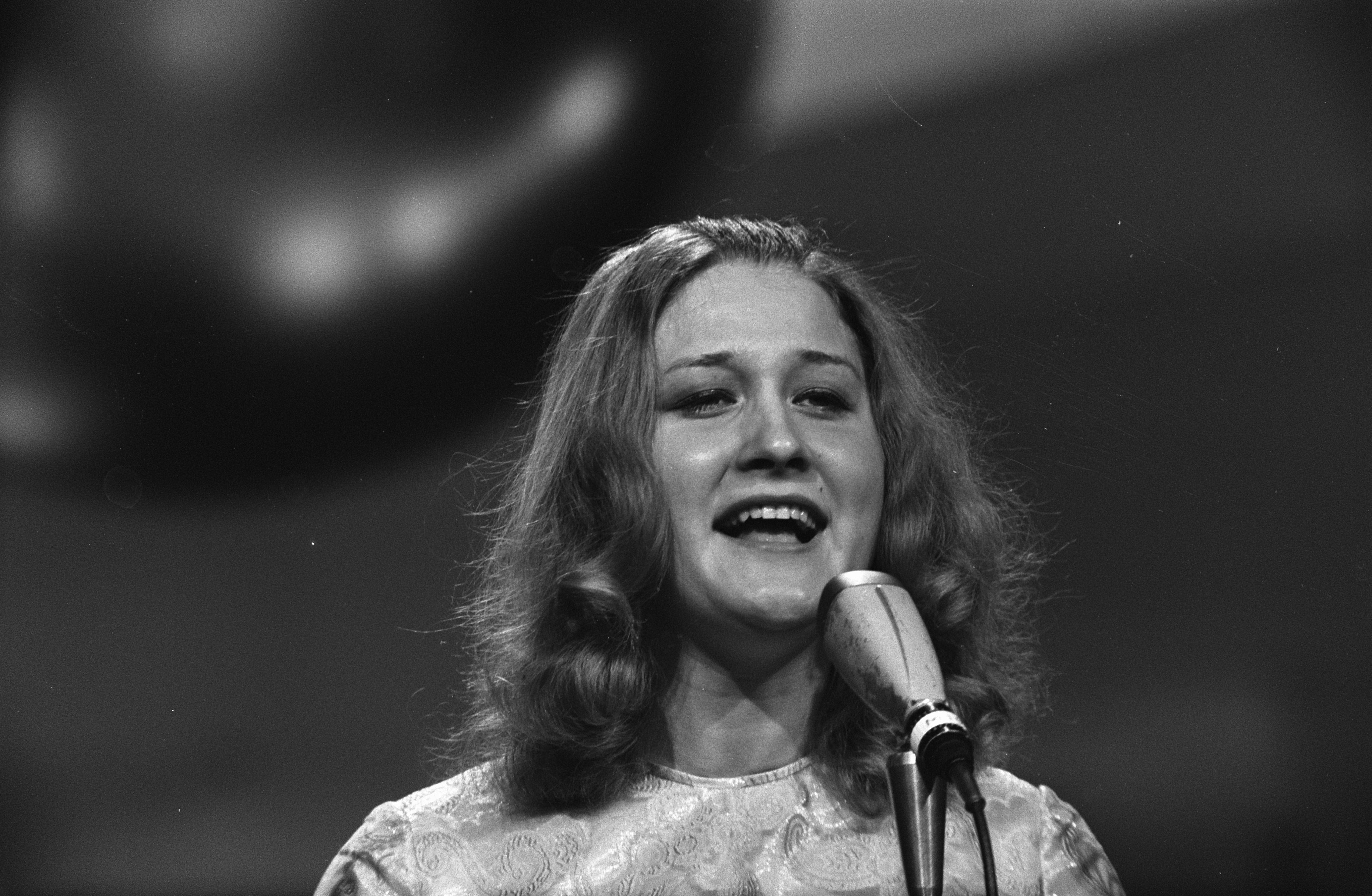 Collectie / Archief : Fotocollectie Anefo Reportage / Serie : [ onbekend ] Beschrijving : Eurovisie Song Festival in RAI Amsterdam, repetities. Eva Srsen (Joegoslavie) zingt Datum : 18 maart 1970 Locatie : Amsterdam Trefwoorden : muziek, songfestivals, zangeressen Persoonsnaam : Srsen, Eva Instellingsnaam : Eurovisie Song Festival Fotograaf : Koch, Eric / Anefo Auteursrechthebbende : Nationaal Archief Materiaalsoort : Negatief (zwart/wit) Nummer archiefinventaris : bekijk toegang 2.24.01.05 Bestanddeelnummer : 923-3592